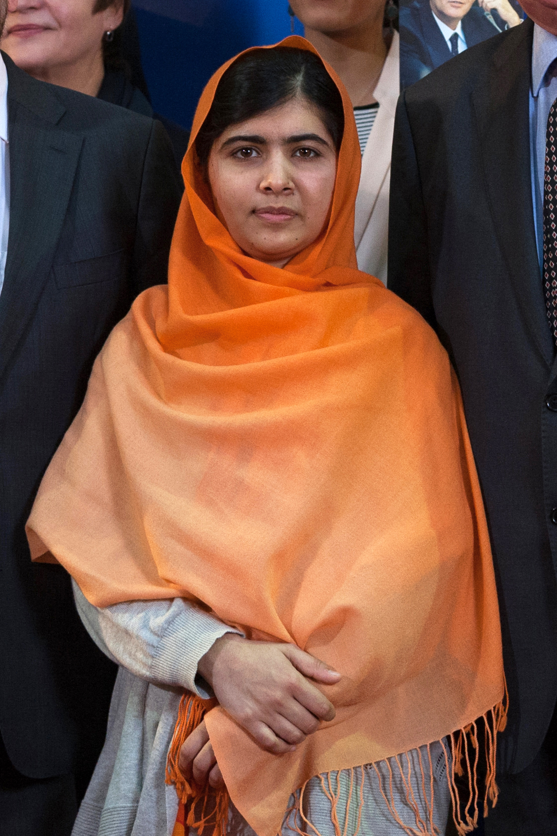 Photo de famille lors de la remise du 25e prix Sakharov à à Malala Yousafzai Strasbourg 20 novembre 2013